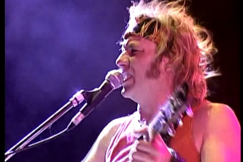 Gustavo Napoli en 2004